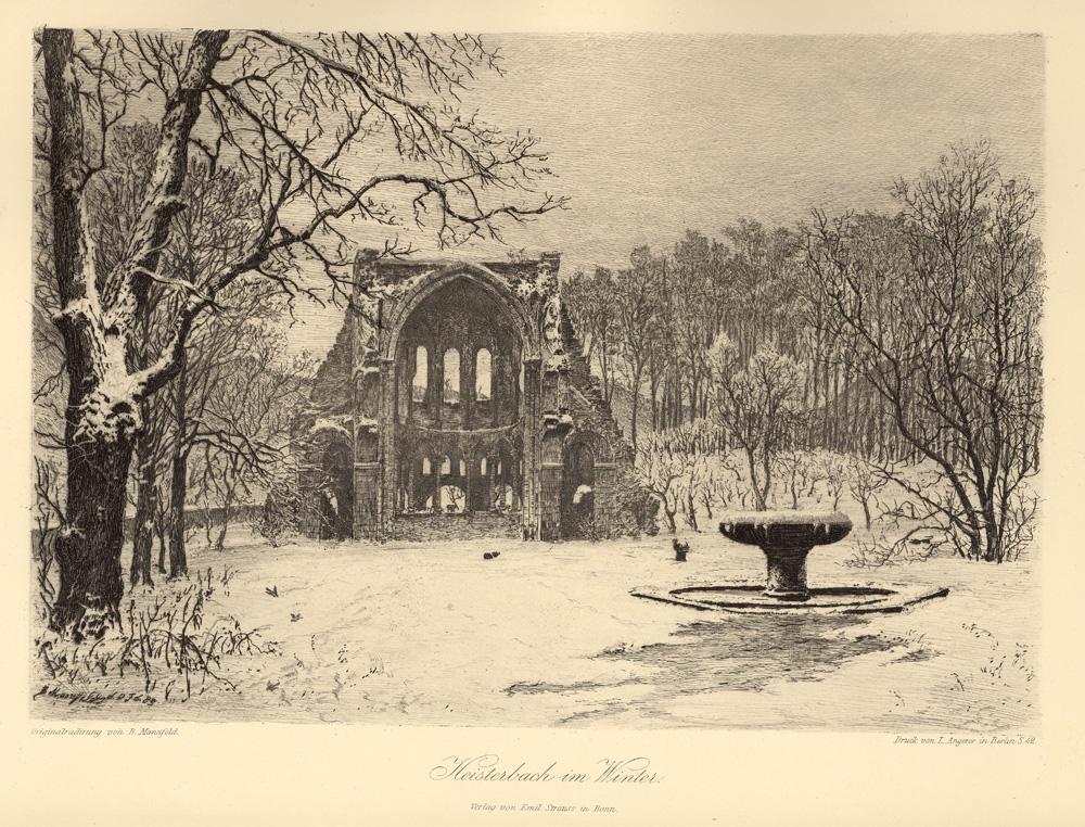 Chorruine Heisterbach 1890